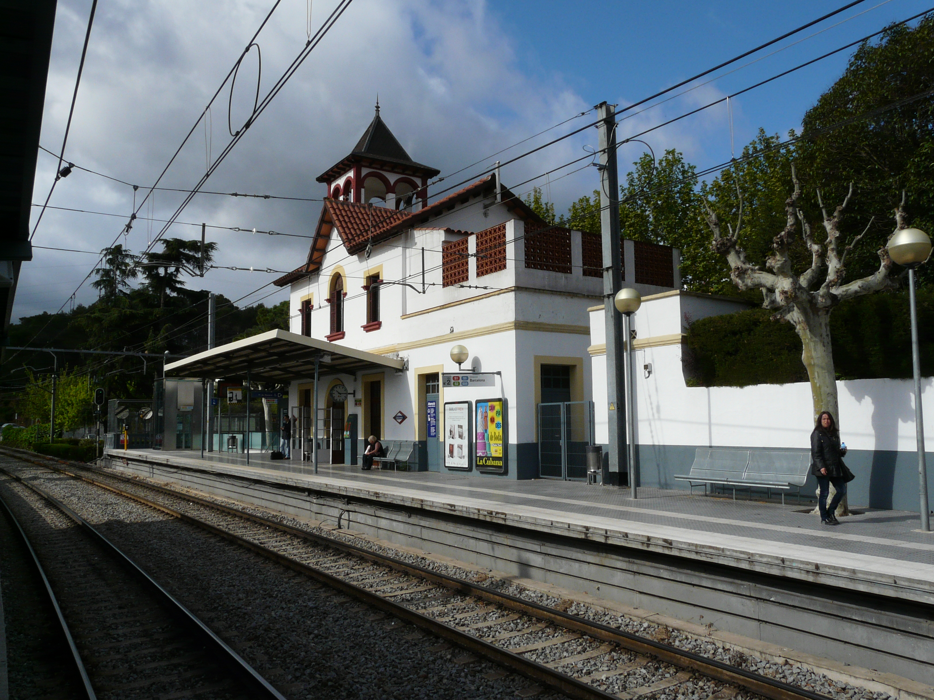 Estació de Valldoreix (Sant Cugat del Vallès) Object location41° 27′ 28.3″ N, 2° 04′ 05.71″ E